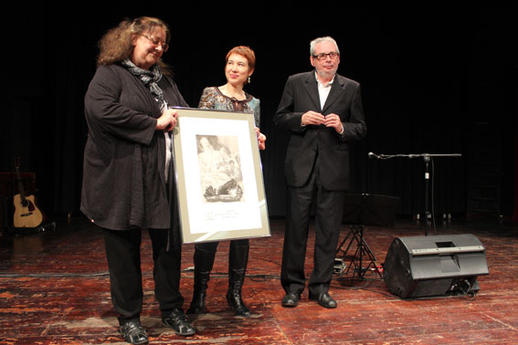 Dolors Garcia i Cornellà reb el 32é Premi Enric Valor de l'editora Núria Sendra i l'alcalde Josep Almenar